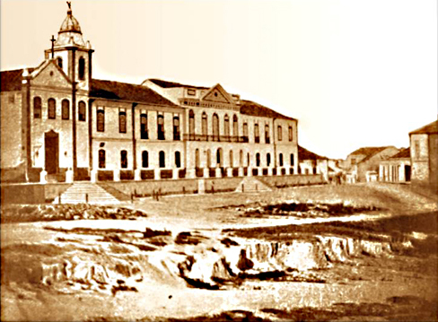 Santa Casa de Porto Alegre, tendo ao lado a Capela Senhor dos Passos